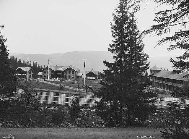 Breidablikk Sanatorium, Tonsåsen